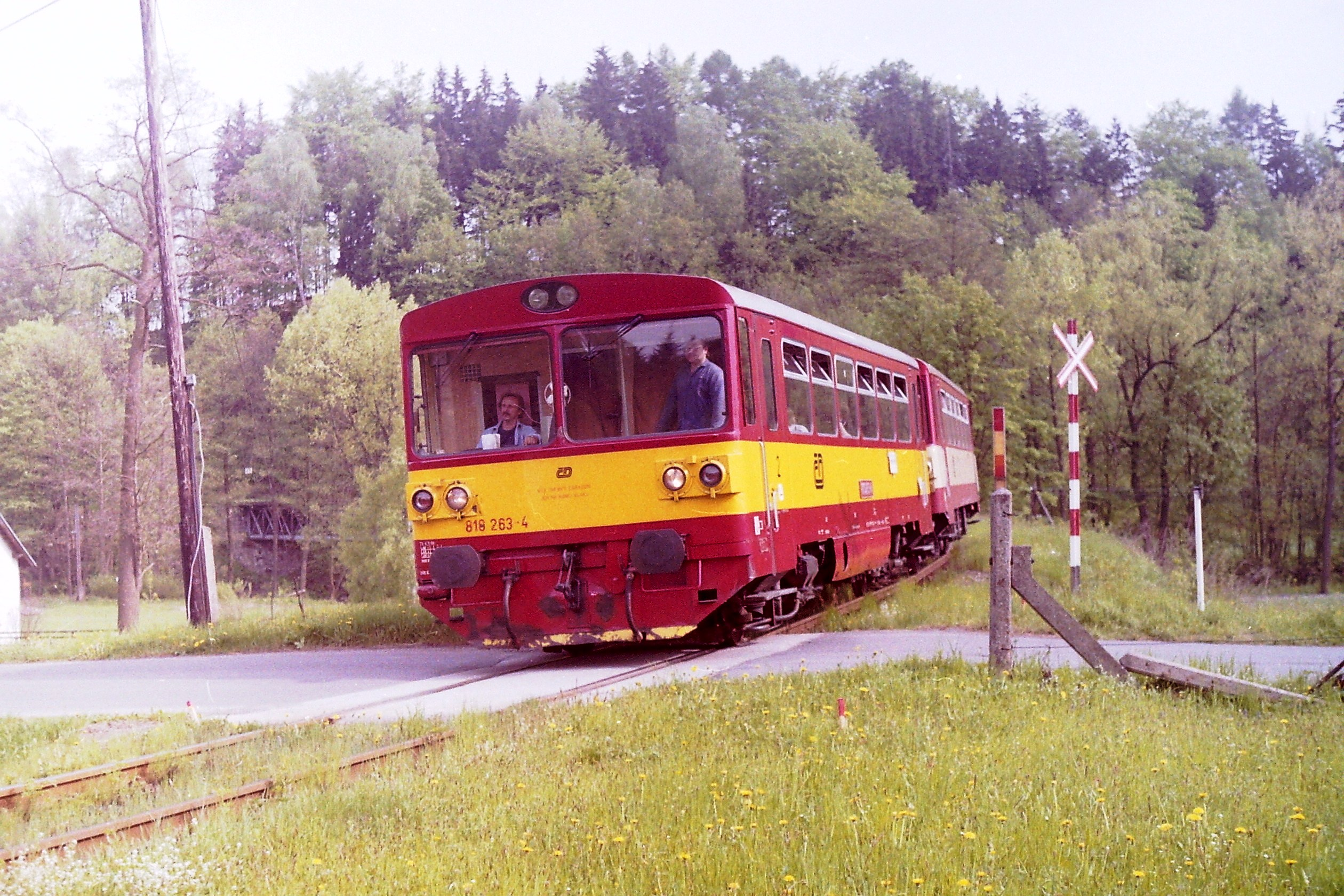 Motorový osobní vlak č. 15518 vedený motorovým vozem 810.263 přijíždí do zastávky Horní Sytová.